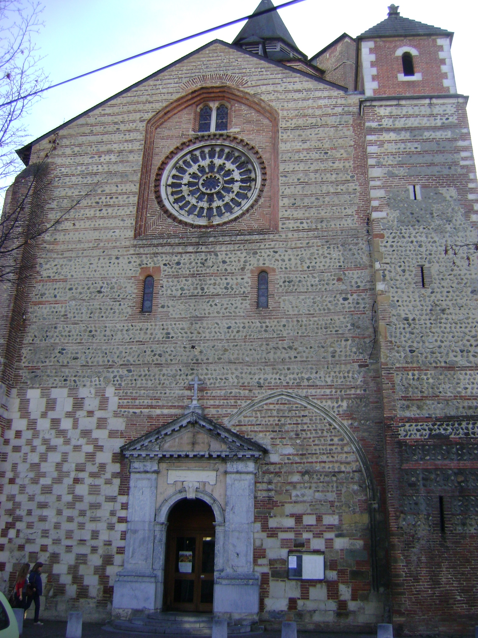 Cathédrale Notre-Dame-de-la-Sède, Tarbes, Hautes-Pyrénées. Le transept nord.